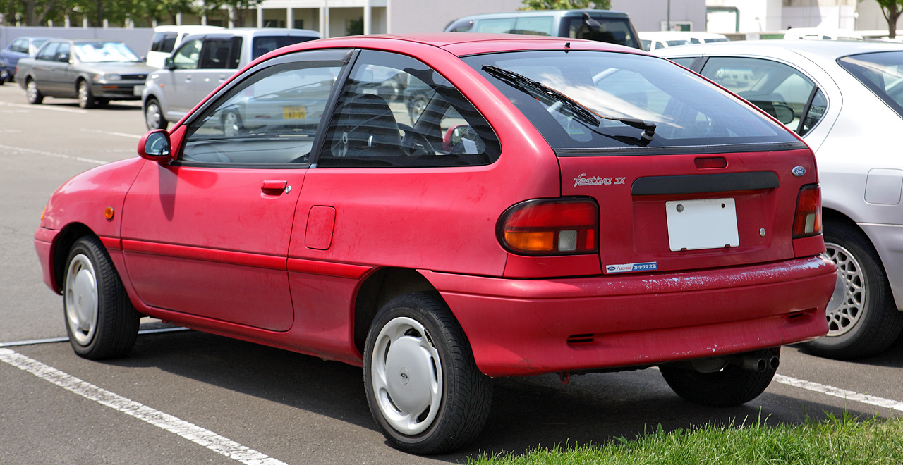 Ford Festiva 1.5 SX ( D25PF )